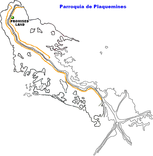 Promised Land, Louisiana.